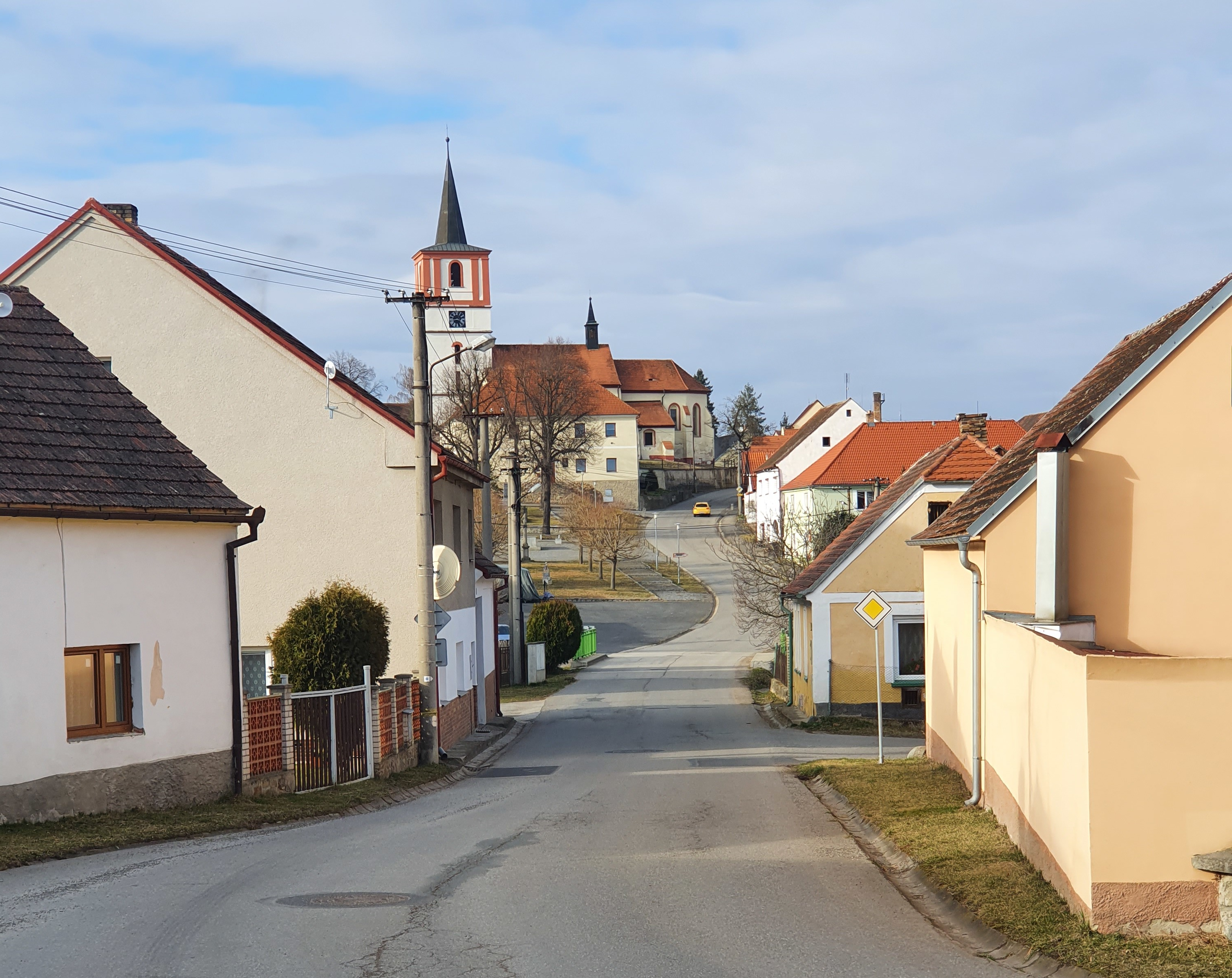 Volenice